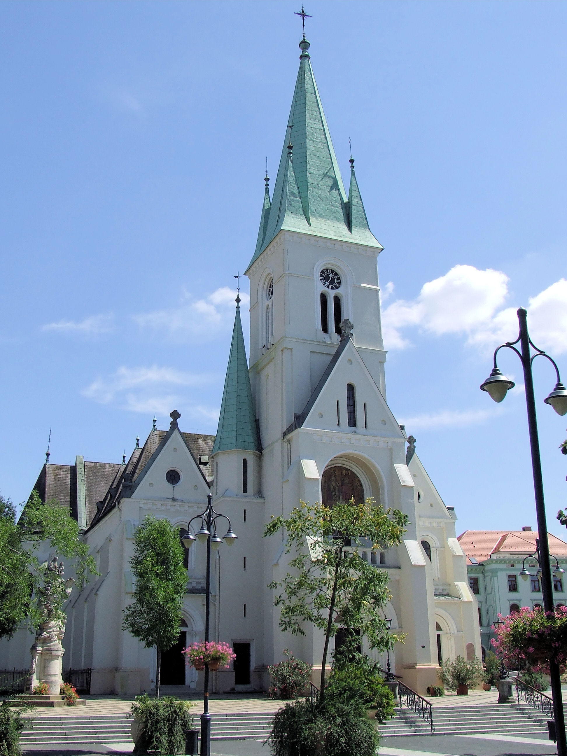 A kaposvári Nagyboldogasszony-templom